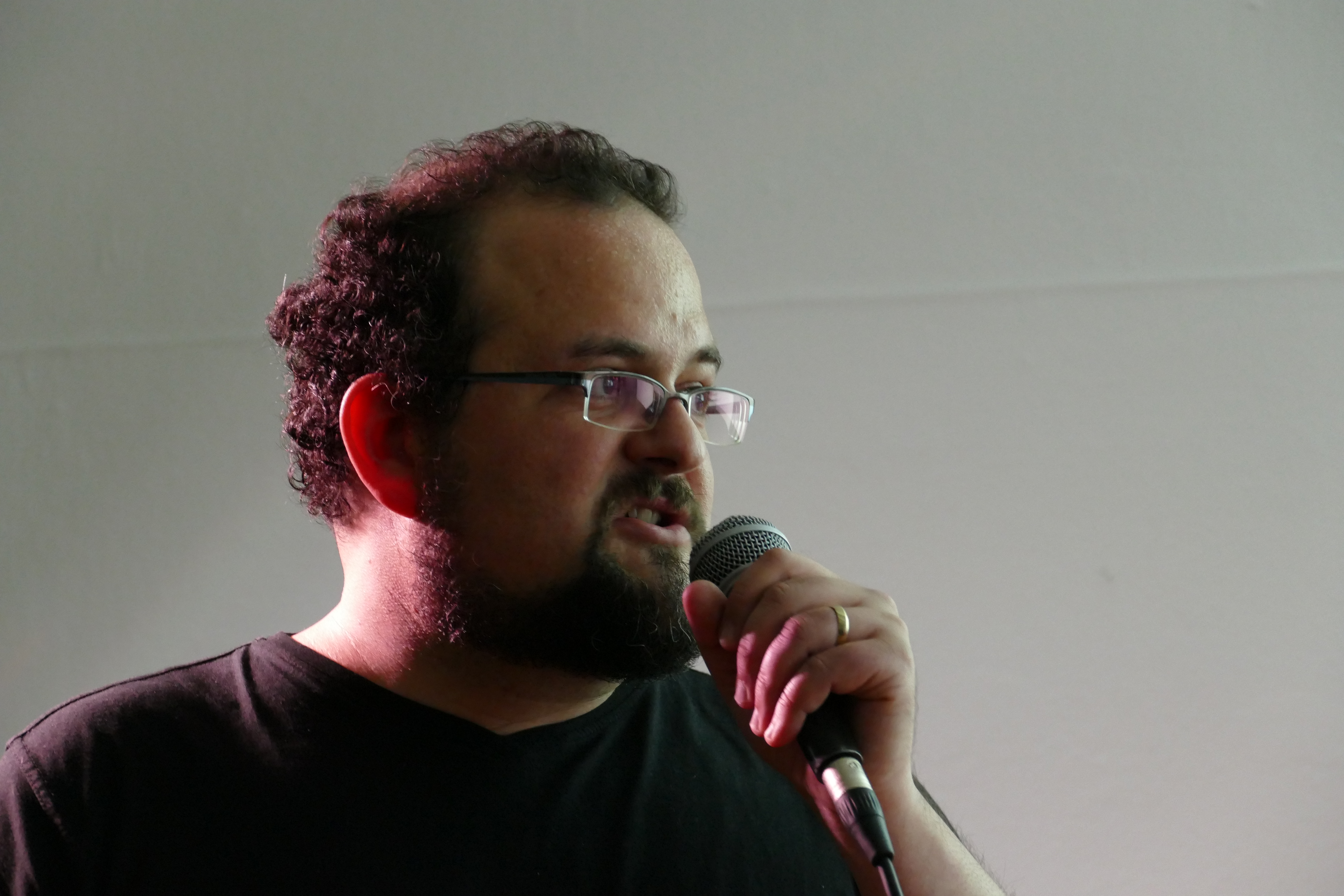 Konstatin Ames bei einer Lesung in der Lettrétage